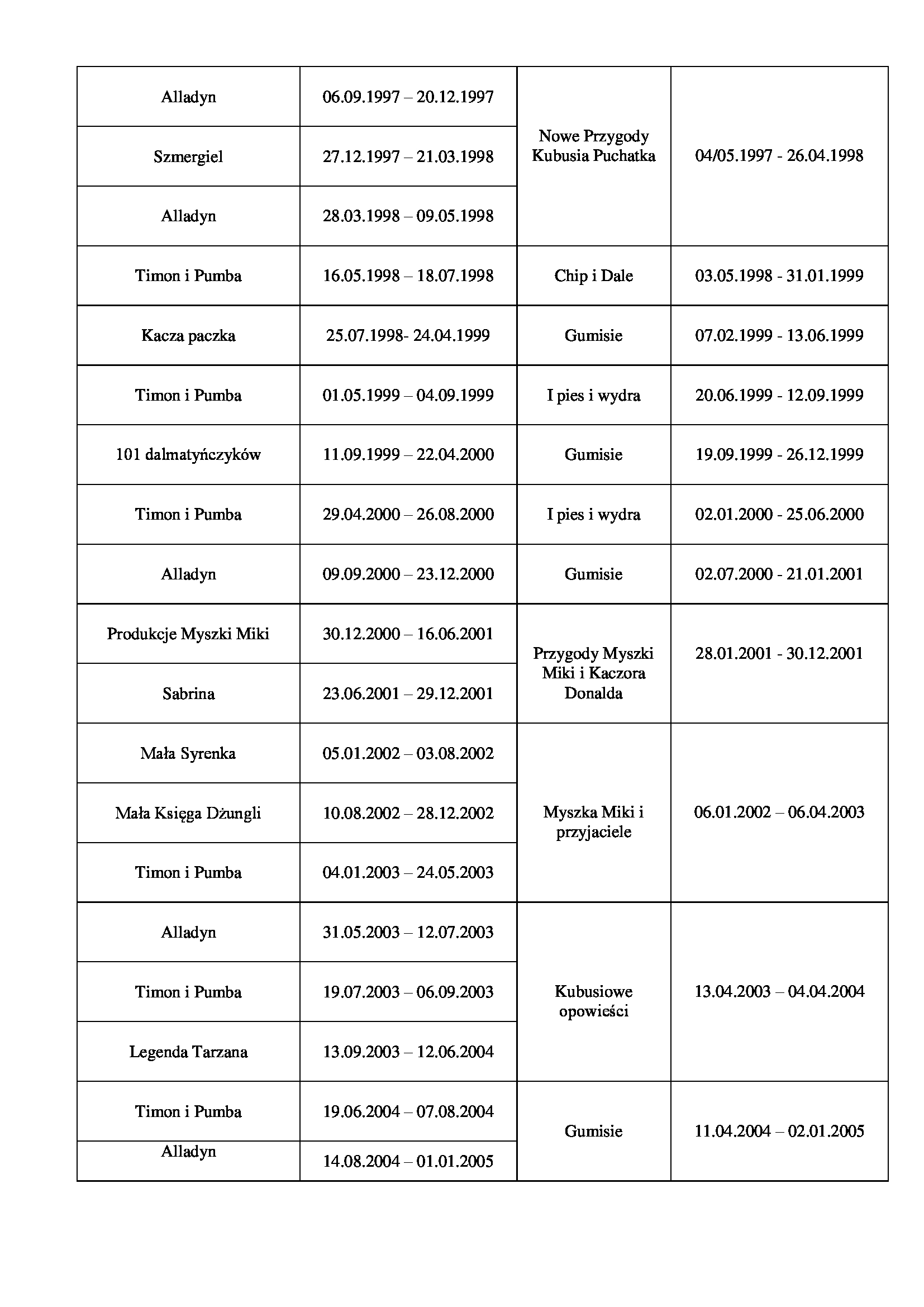 Chronologiczne zestawienie dat emisji seriali animowanych emitowanych w ramach bloku Walt Disney Przedstawia